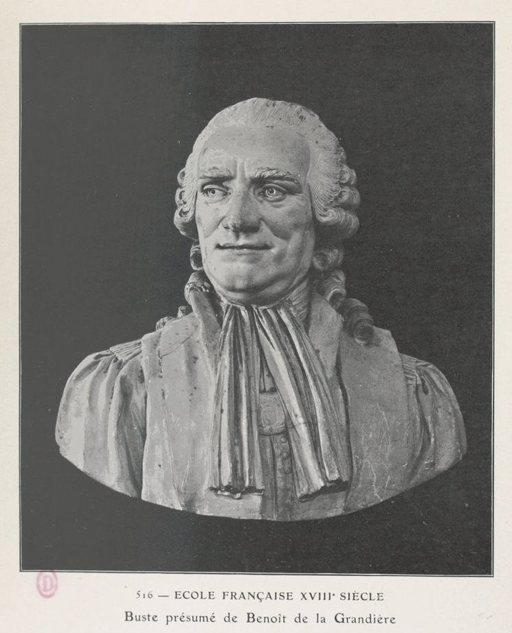 Buste présumé d'Étienne Benoist de la Grandière, maire de Tours